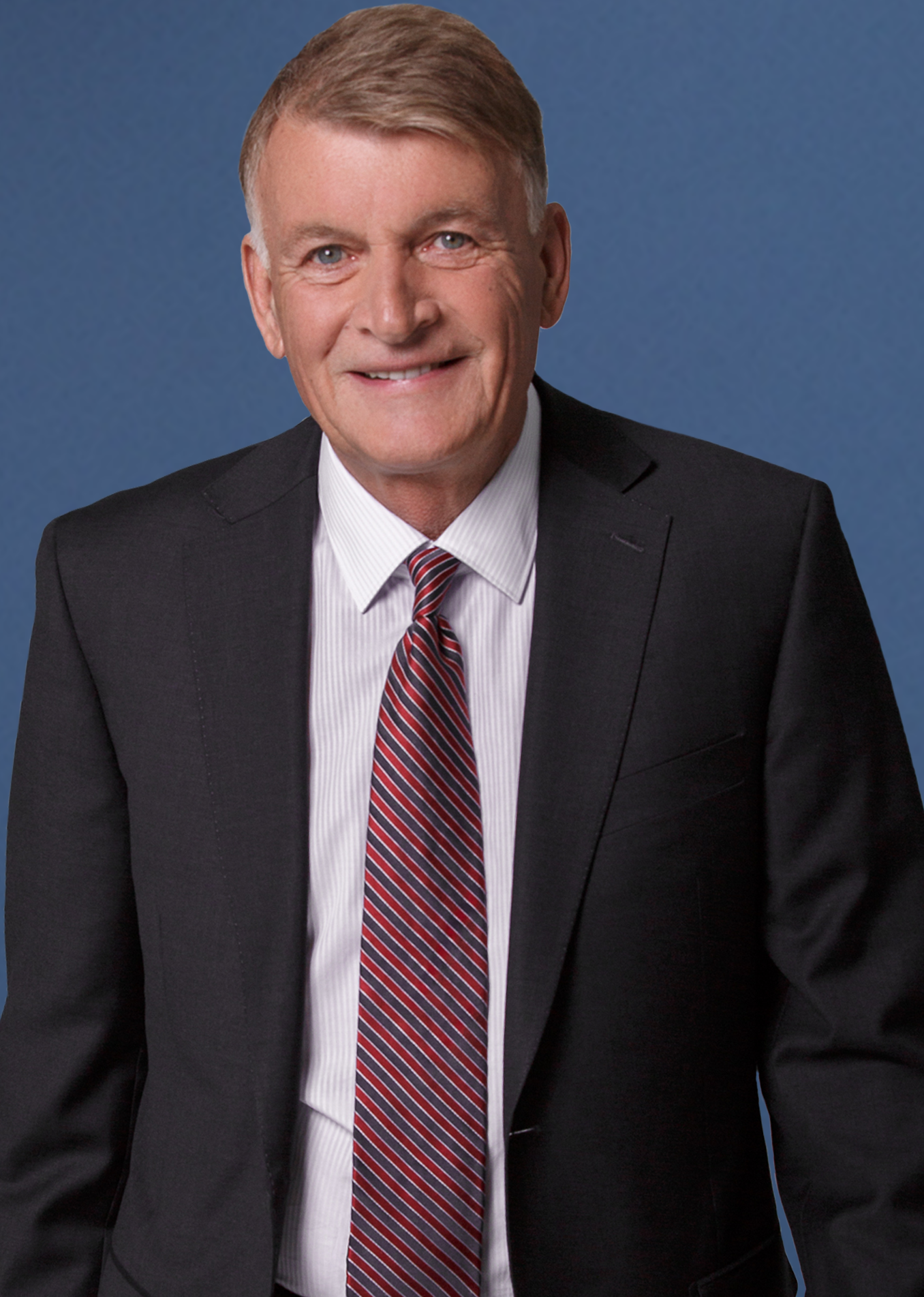 Jean-Claude Gobé, 2016, Chef de l'Opposition officielle à la Ville de Laval et Chef d'Action Laval - Équipe Jean-Claude Gobé.